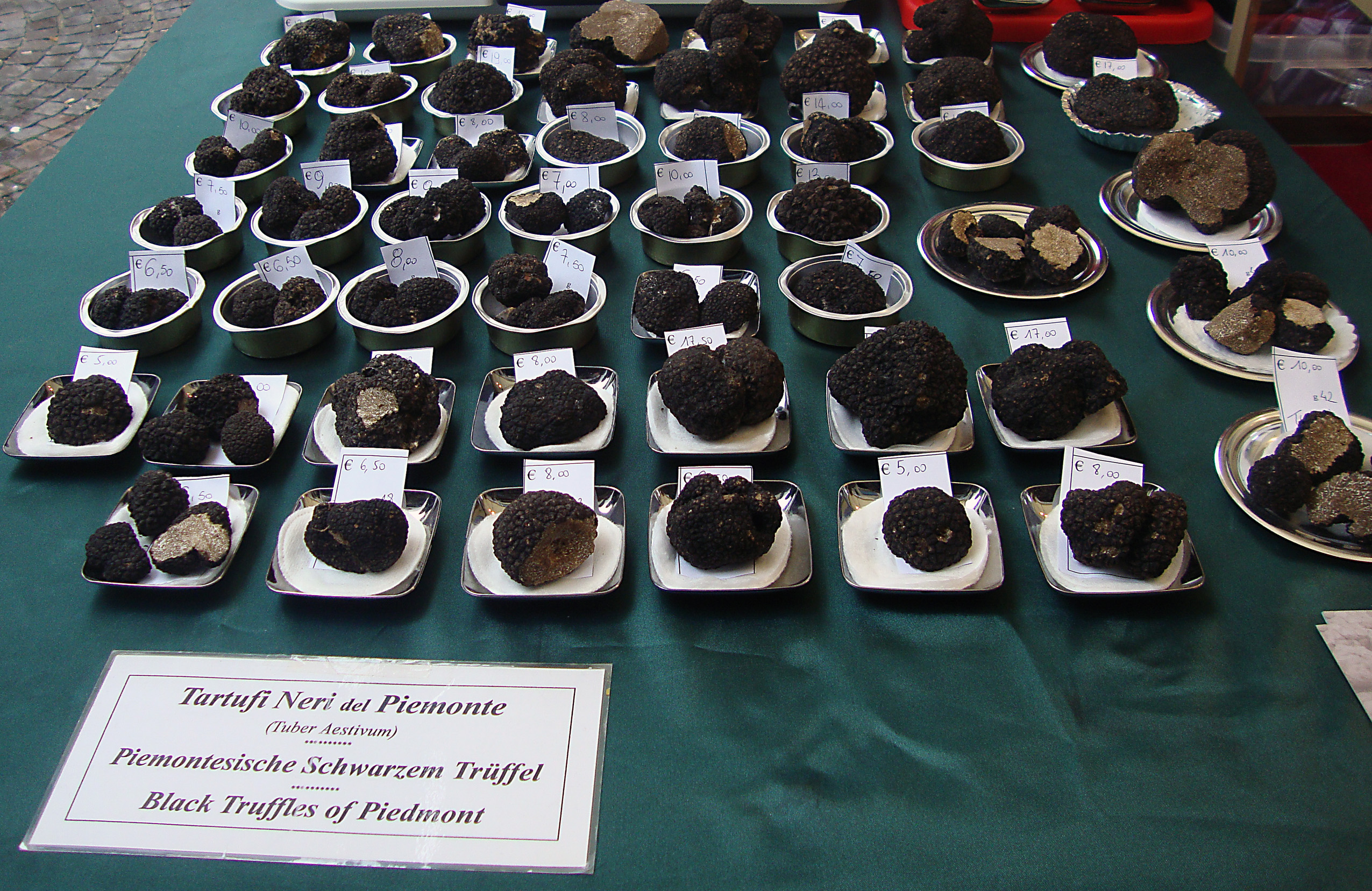 Fiera Internazionale del tartufo di Alba Piemonte - Italia